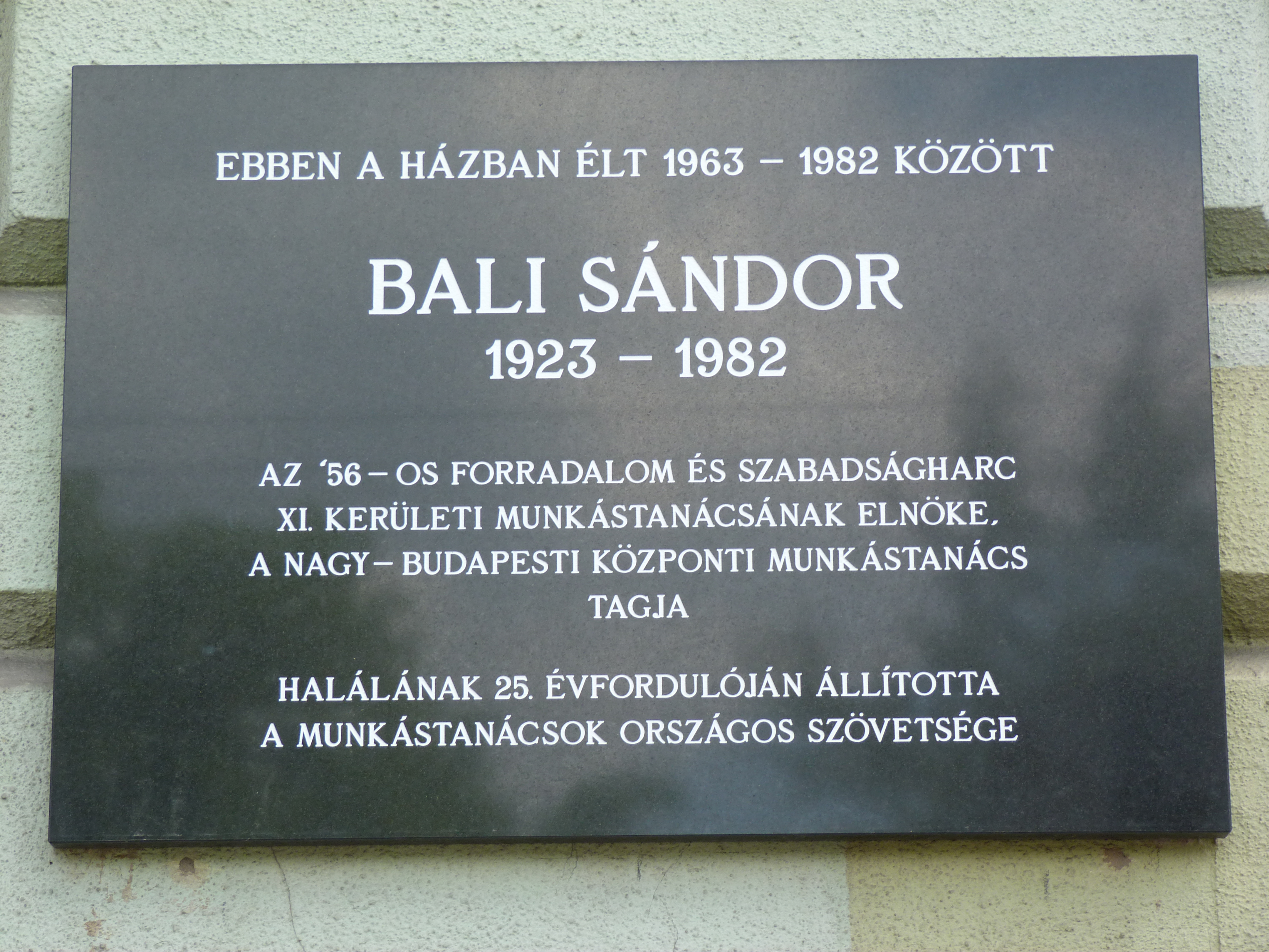 A felvétel 2013. augusztus 1 -én, csütörtökön készült. Budapest. Terézváros, Podmaniczky utca 63 szám.